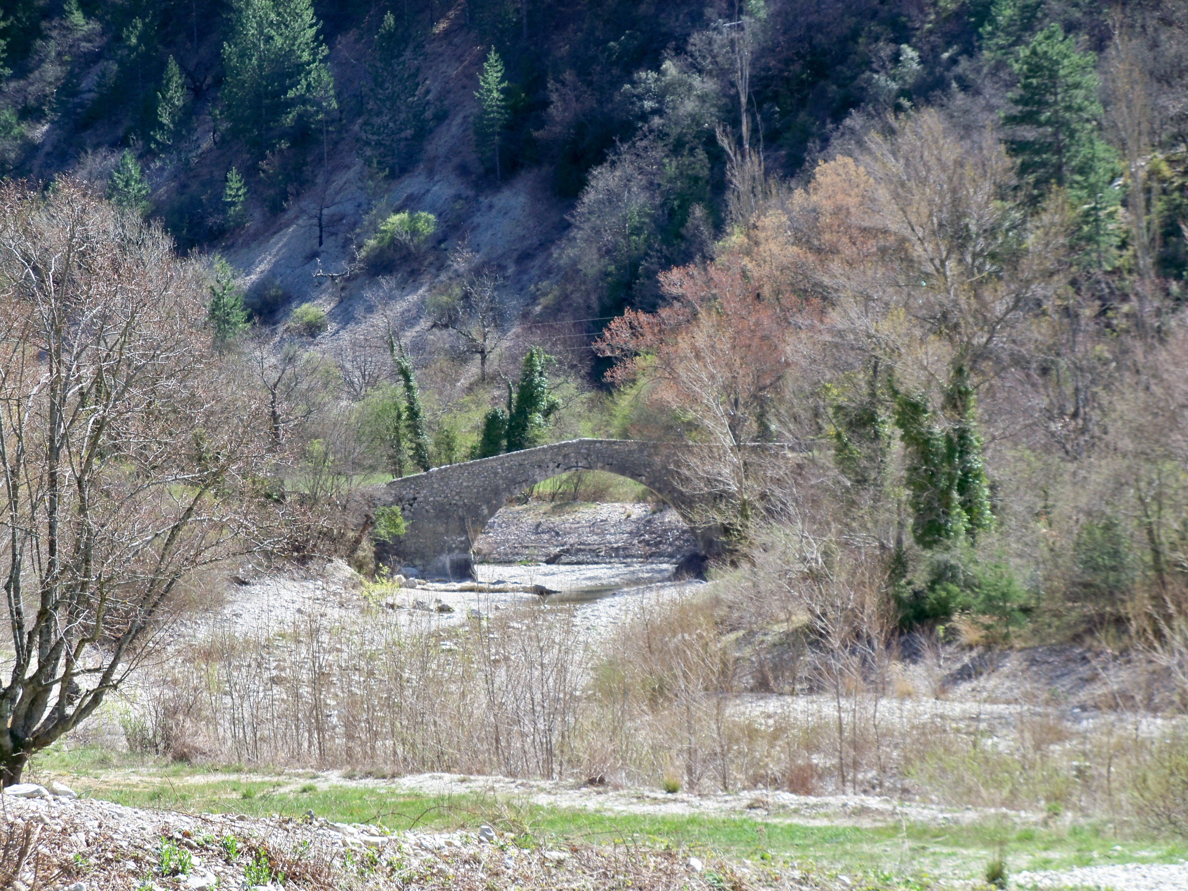 Pont sur le Toulourenc à Brantes (84)